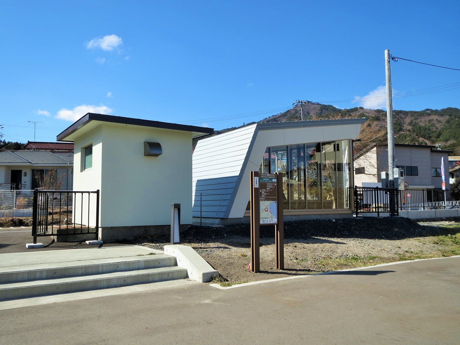 復旧直後の浪板海岸駅 Canon IXY 3